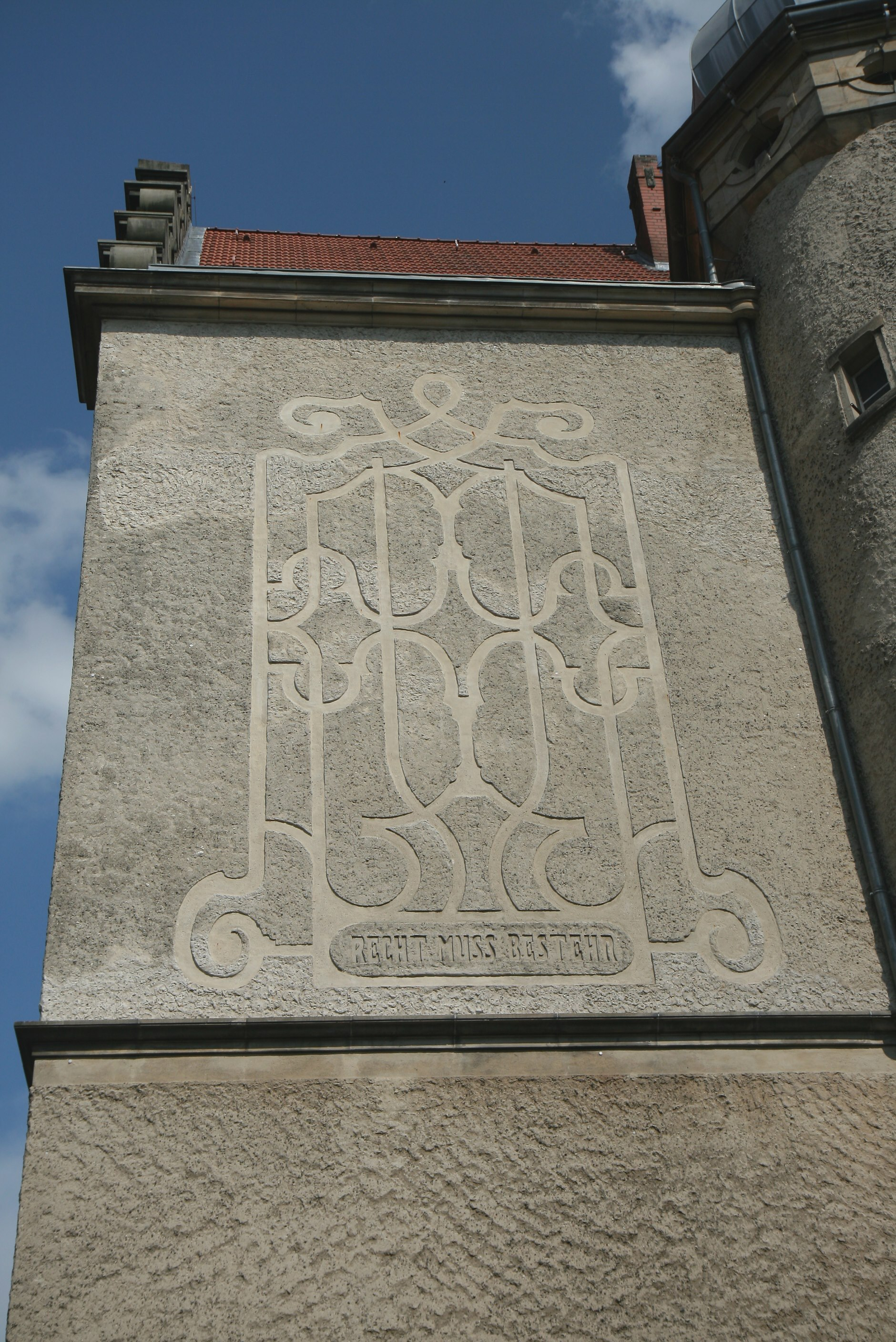 Gebäude des Landgerichts Stade und Amtsgerichts Stade, Wilhadikirchhof 1 in Stade.